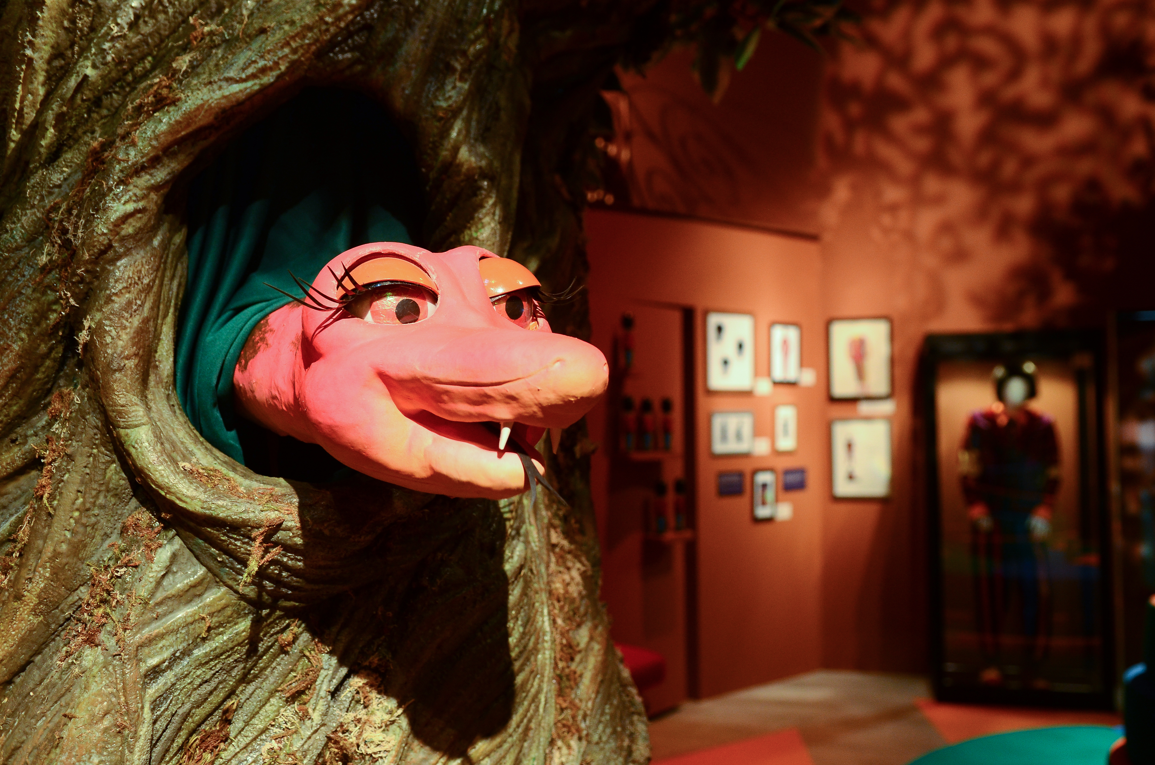 São Paulo - Memorial da América Latina, em parceria com o Governo do Estado de São Paulo, inaugura a exposição "Rá-Tim-Bum, o Castelo", que recria os cenários do seriado produzido pela TV Cultura na década de 90 (Rovena Rosa/Agência Brasil)